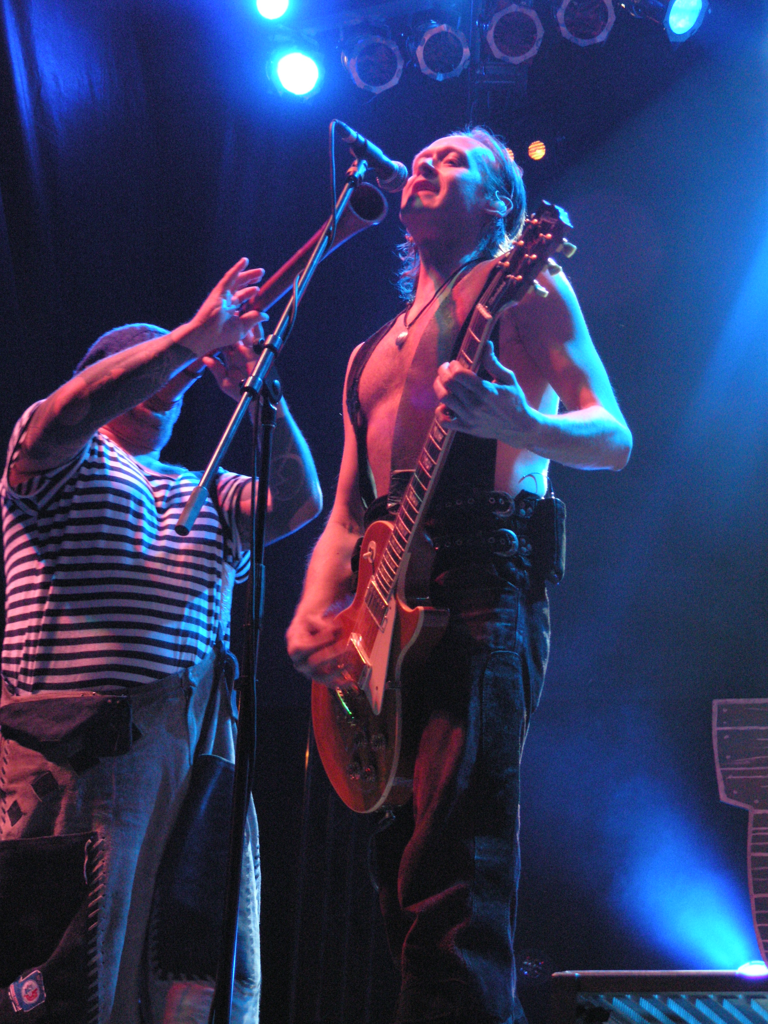 Zespół In Extremo w czasie festiwalu Masters of Rock 2007